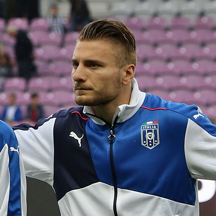 Portugal vs Italie, Genève, 2015, Ciro Immobile.